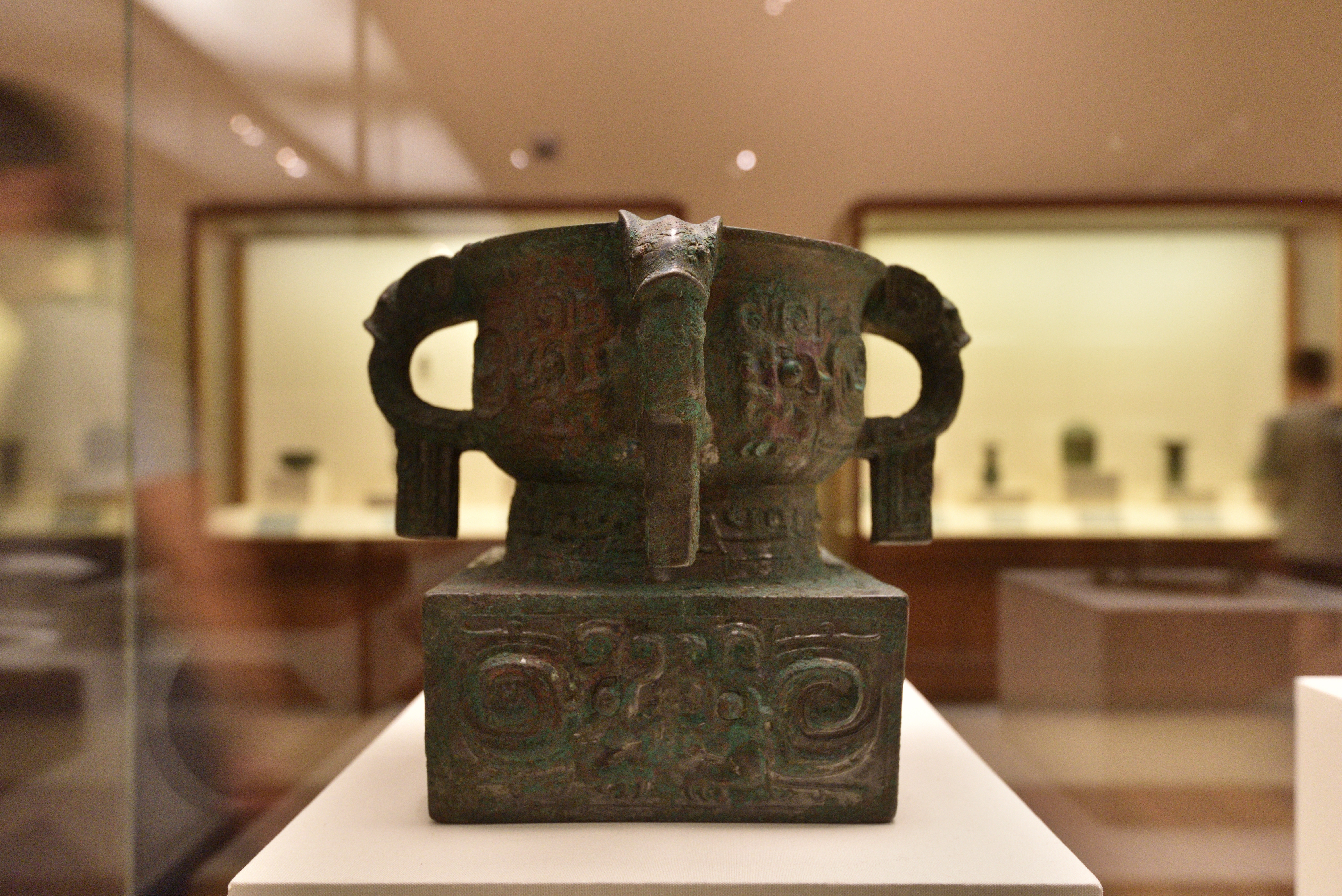 中国国家博物馆藏天亡簋